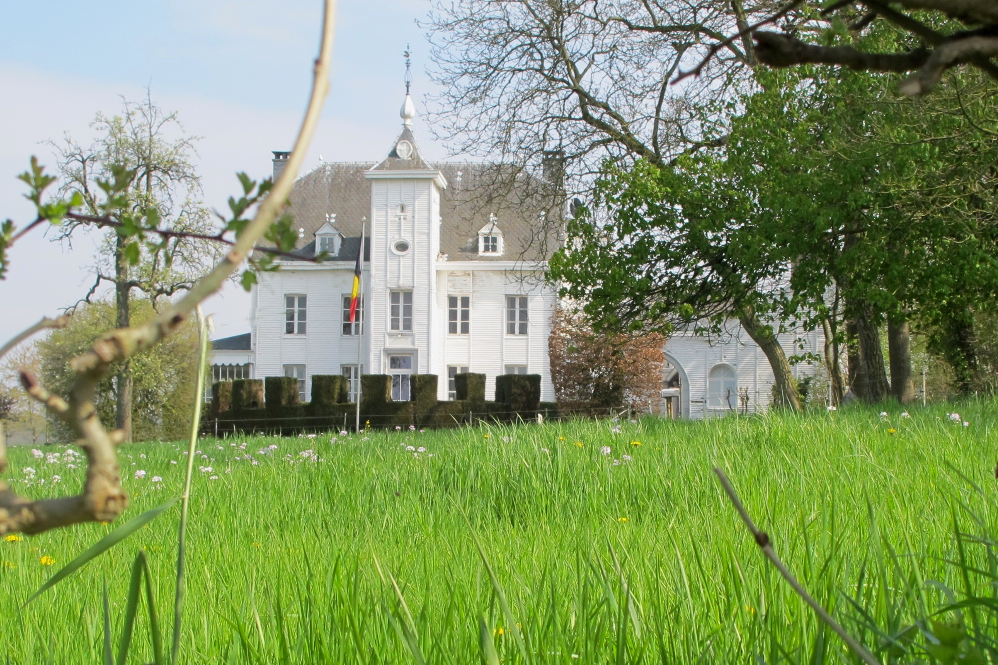 Château de Goé (Limbourg) Belgique